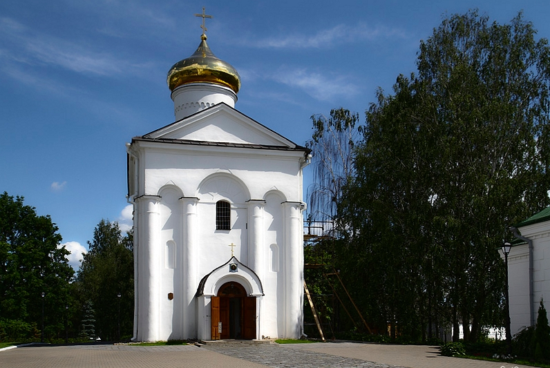 Полацк. Спаса-Праабражэнская царква, Полацк